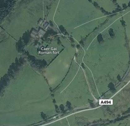 Vue satellite du site de anglo-romain de Caer Gai et le lime en bas à droite. Province du Cheshire.